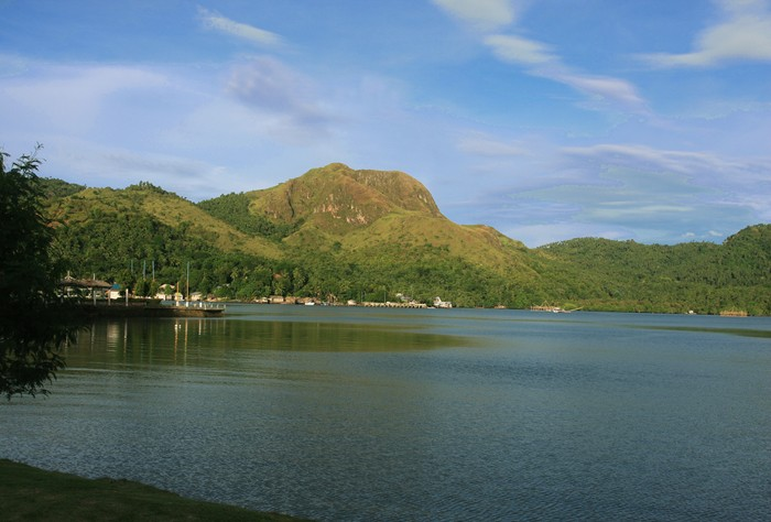 DAKAK riverside Dapitan City, Zamboanga del Norte, Philippines